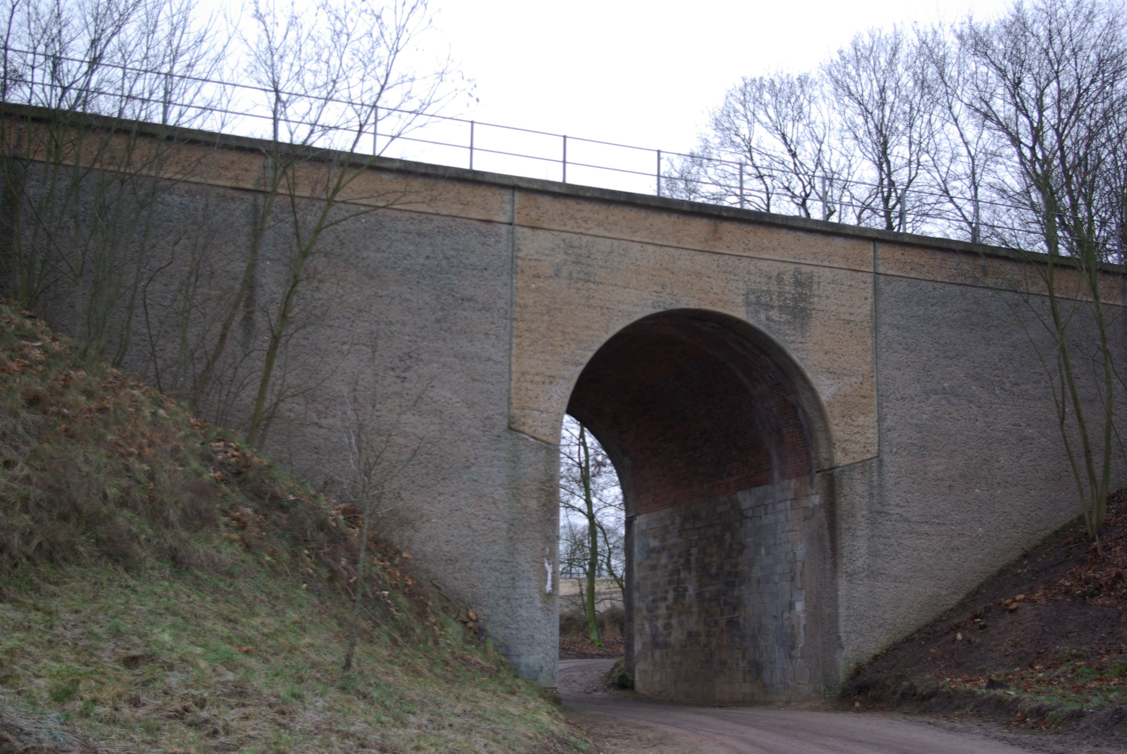 Podelzig in Brandenburg. Sie gehörte zur Bahnstrecke Küstrin-Kietz–Frankfurt (Oder).